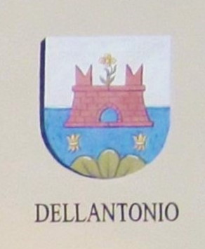 Cognomi storici dei Vicini che discendono dalle famiglie della Regola che abitavano a Predazzo e riguardano 19 cognomi: Boninsegna, Bonora, Bosin, Brigadoi, Defrancesco, Degaudenz, Dellagiacoma, Dellantonio, Dellasega, Demartin, Dezulian, Felicetti, Gabrielli, Giacomelli, Guadagnini, Morandini, Nicolao, Piazzi e Zanna.